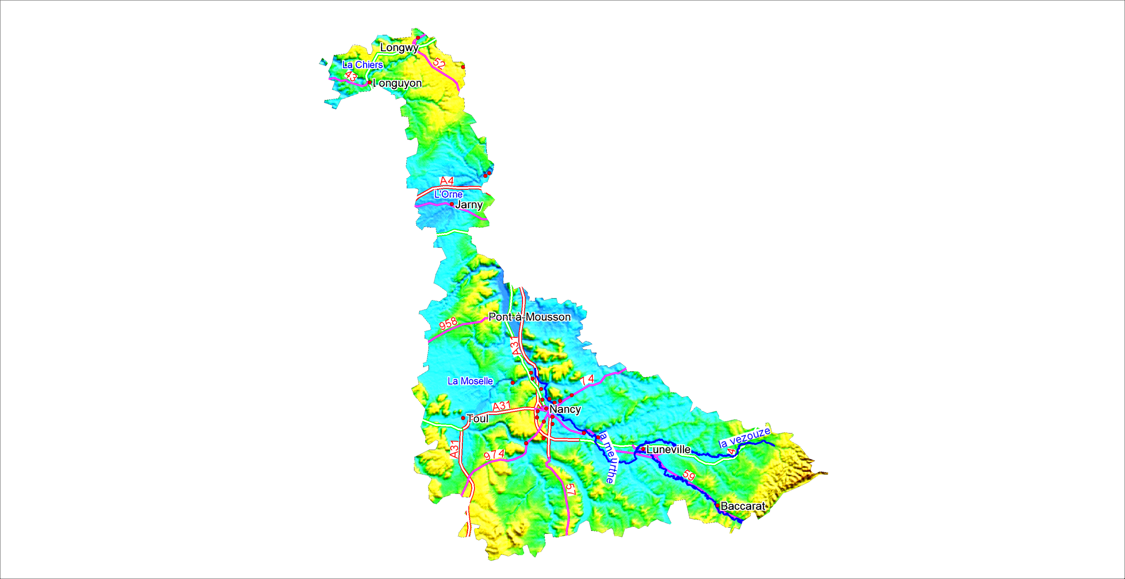 Reliefs, cours d'eau, voies routières, villes